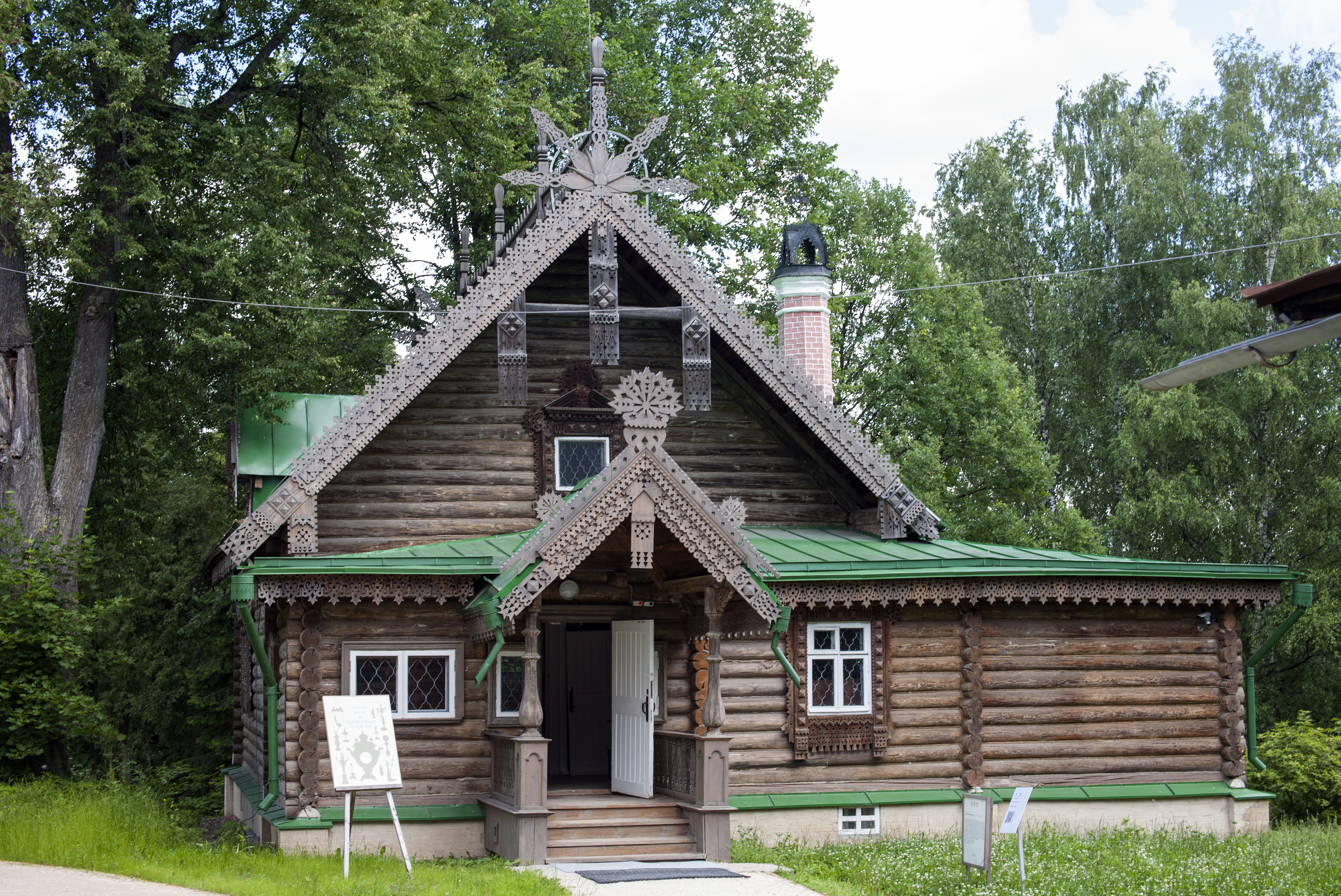 Музей-заповедник Абрамцево. Студия-мастерская построена в 1873 году по проекту архитектора Виктора Александровича Гартмана (1834—1873 гг.) на месте разобранного аксаковского флигеля, к юго-востоку от усадебного дома. Одноэтажное деревянное здание состоит из жилой пристройки с низкой, почти плоской крышей, и скульптурной мастерской, перекрытой двускатной кровлей. С западной стороны расположено крыльцо, ведущее в сени, откуда направо — вход в две небольшие комнаты, и прямо — в мастерскую. В мастерской хорошо продуманное естественное освещение.